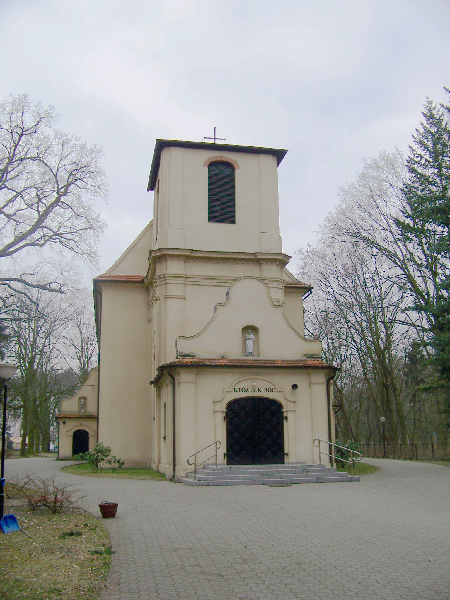 Kościół Wniebowzięcia NMP w Gołuchowie